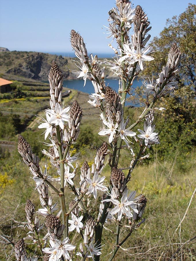 Asphodelus ramosus, photo prise à Cerbère (France) en avril 2005 © Jean Tosti